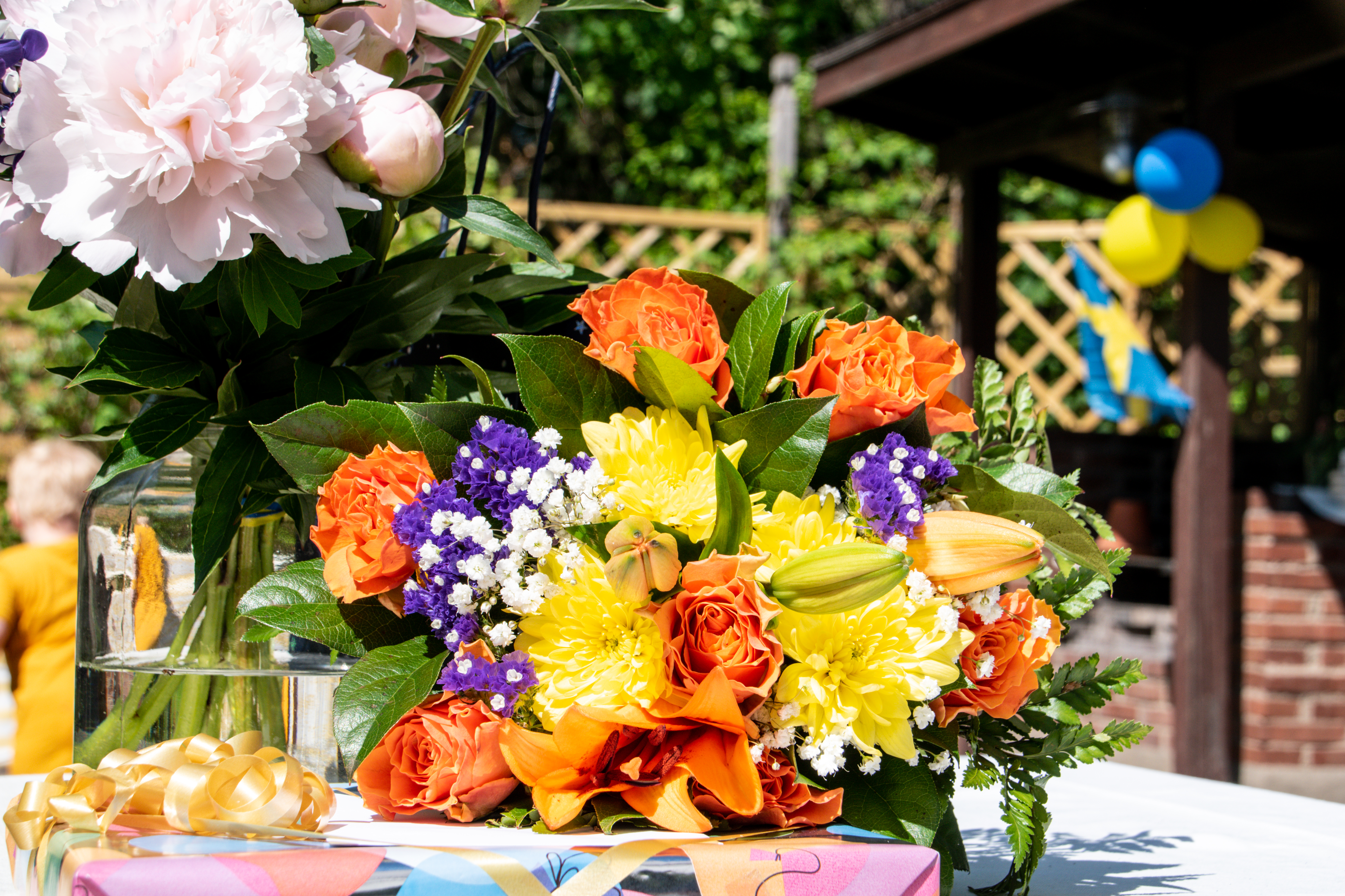 Dekorationer till studentfest.